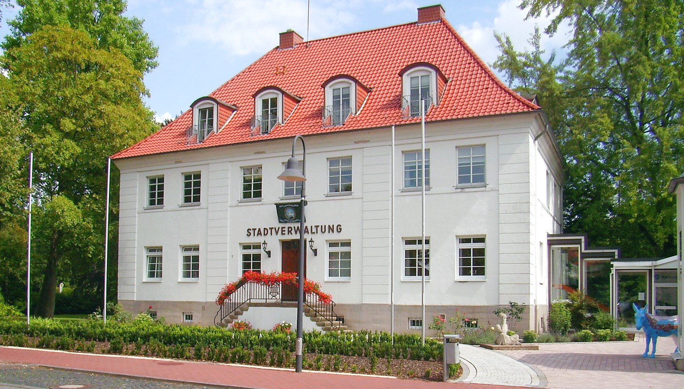 Gebäude der Stadtverwaltung in Hardegsen, Niedersachsen, Deutschland